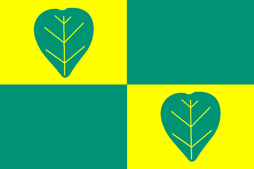 Vlajka obce Podůlší